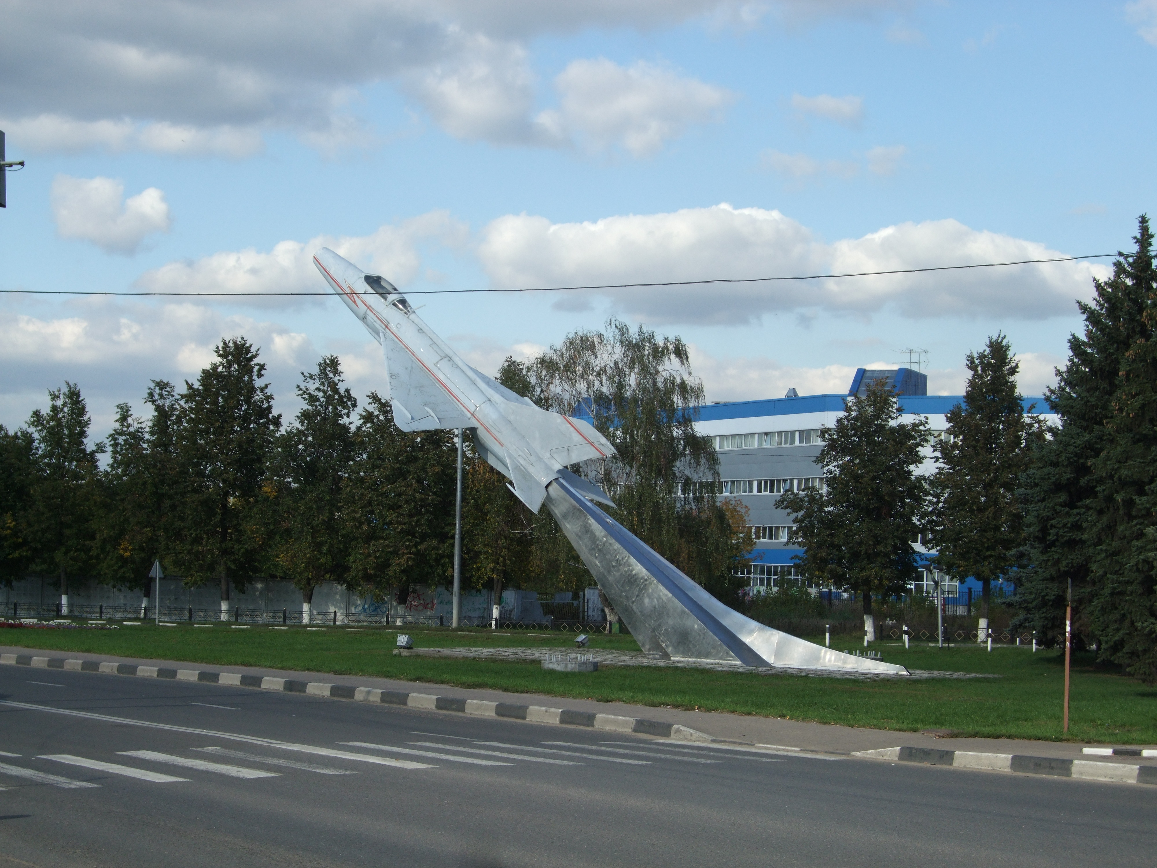 Россия, город Жуковский. Газон на углу улиц Гагарина и Менделеева: памятник самолёту